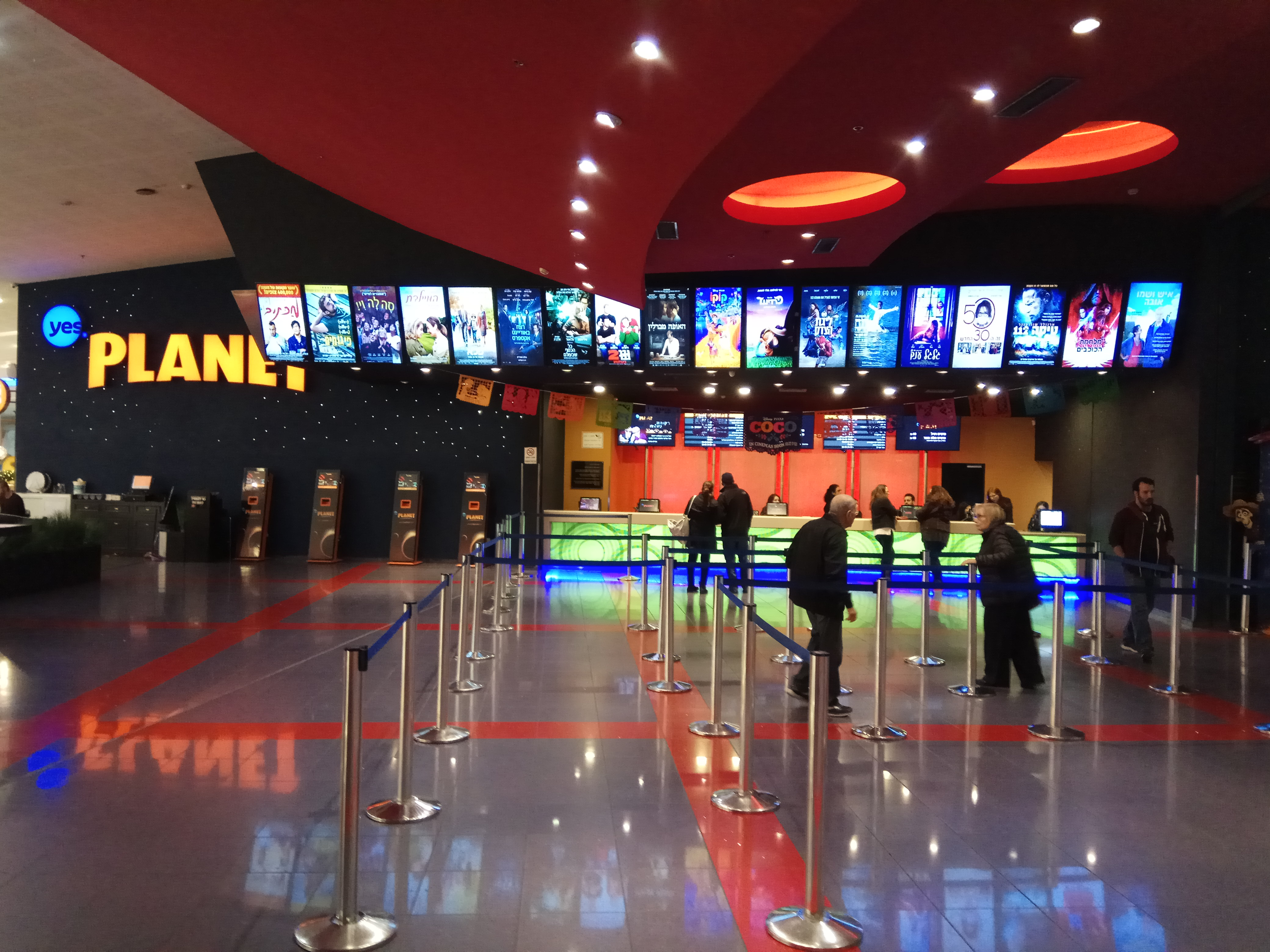 יס פלאנט איילון